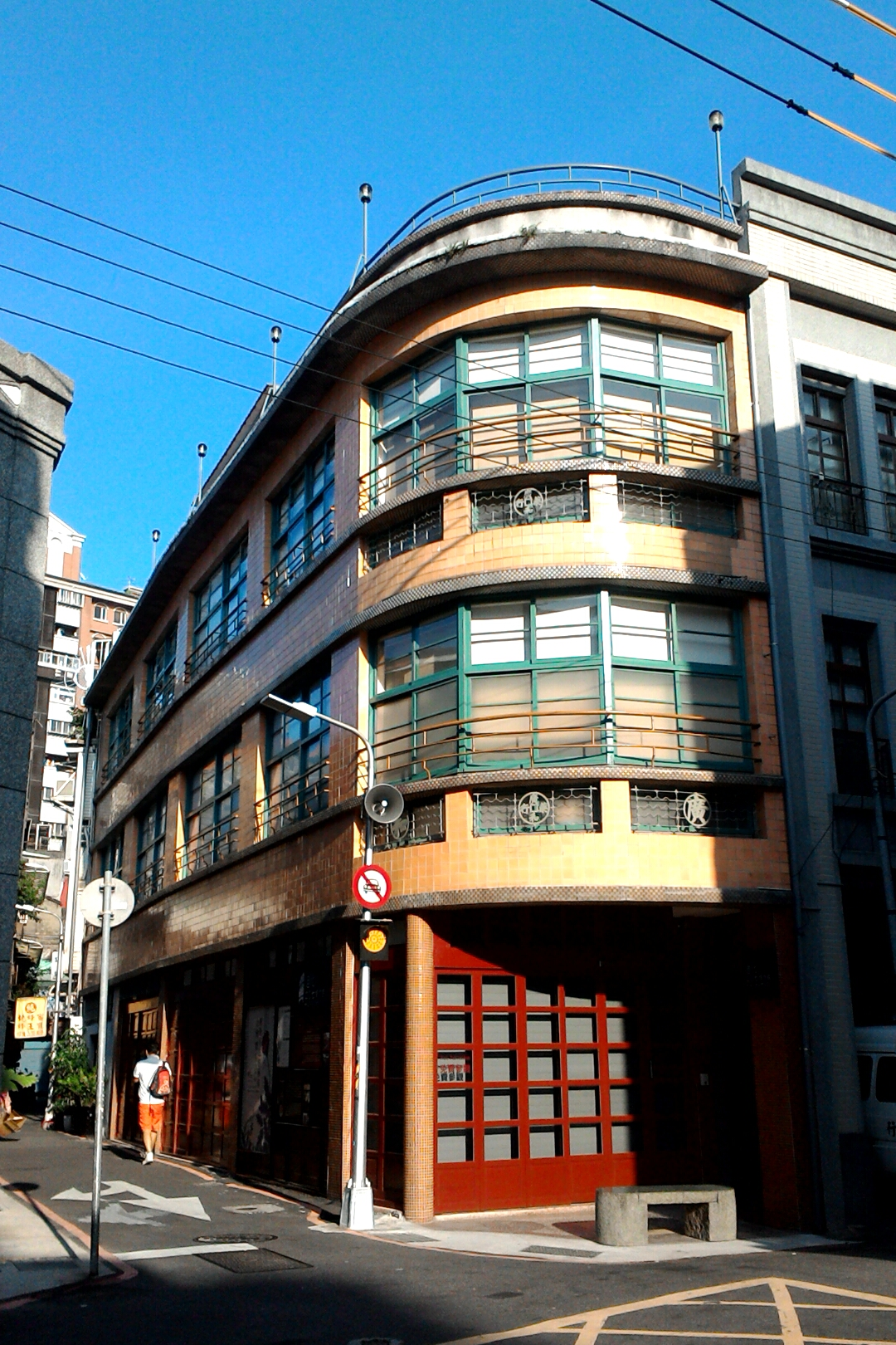 廣和堂藥舖(今迪化207博物館),台北市大同區延平次分區大有里